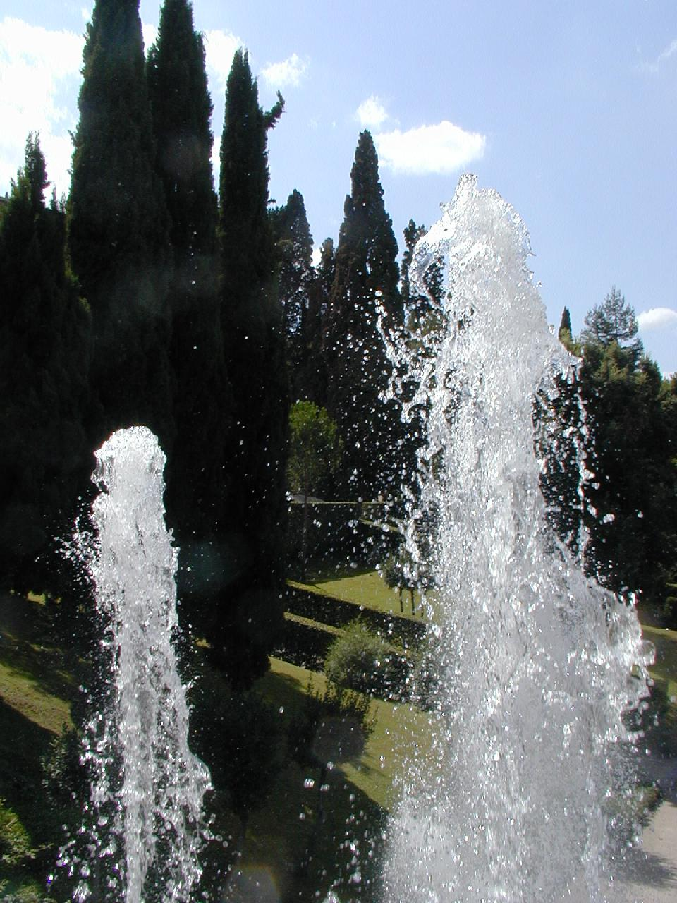 Tivoli, Villa d'Este - zampilli